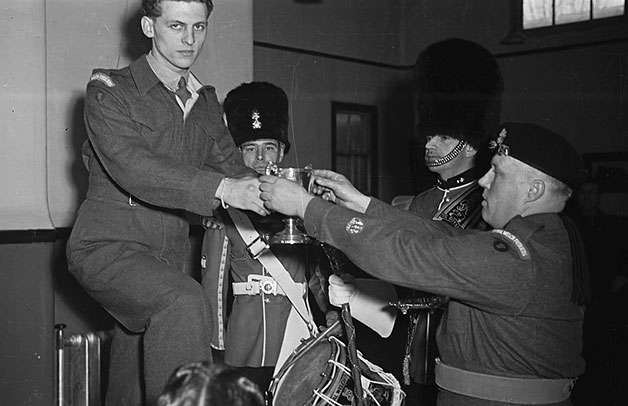 Teitl Cymraeg/Welsh title: Defod bwyta cennin yn depo'r Ffiwsilwyr Brenhinol Cymreig yn Wrecsam, 1 Mawrth 1949 Ffotograffydd/Photographer: Geoff Charles (1909-2002) Dyddiad/Date: 4/3/1949 Cyfrwng/Medium: Negydd ffilm / Film negative Cyfeiriad/Reference: (gcc07463) Rhif cofnod / Record no.: 3473010 Rhagor o wybodaeth am gasgliad Geoff Charles yn Llyfrgell Genedlaethol Cymru More information about the Geoff Charles Collection at the National Library of Wales Mae ffotograffau Geoff Charles hefyd yn rhan o Broject Europeana Libraries Geoff Charles' photographs also form part of the Europeana Libraries Project